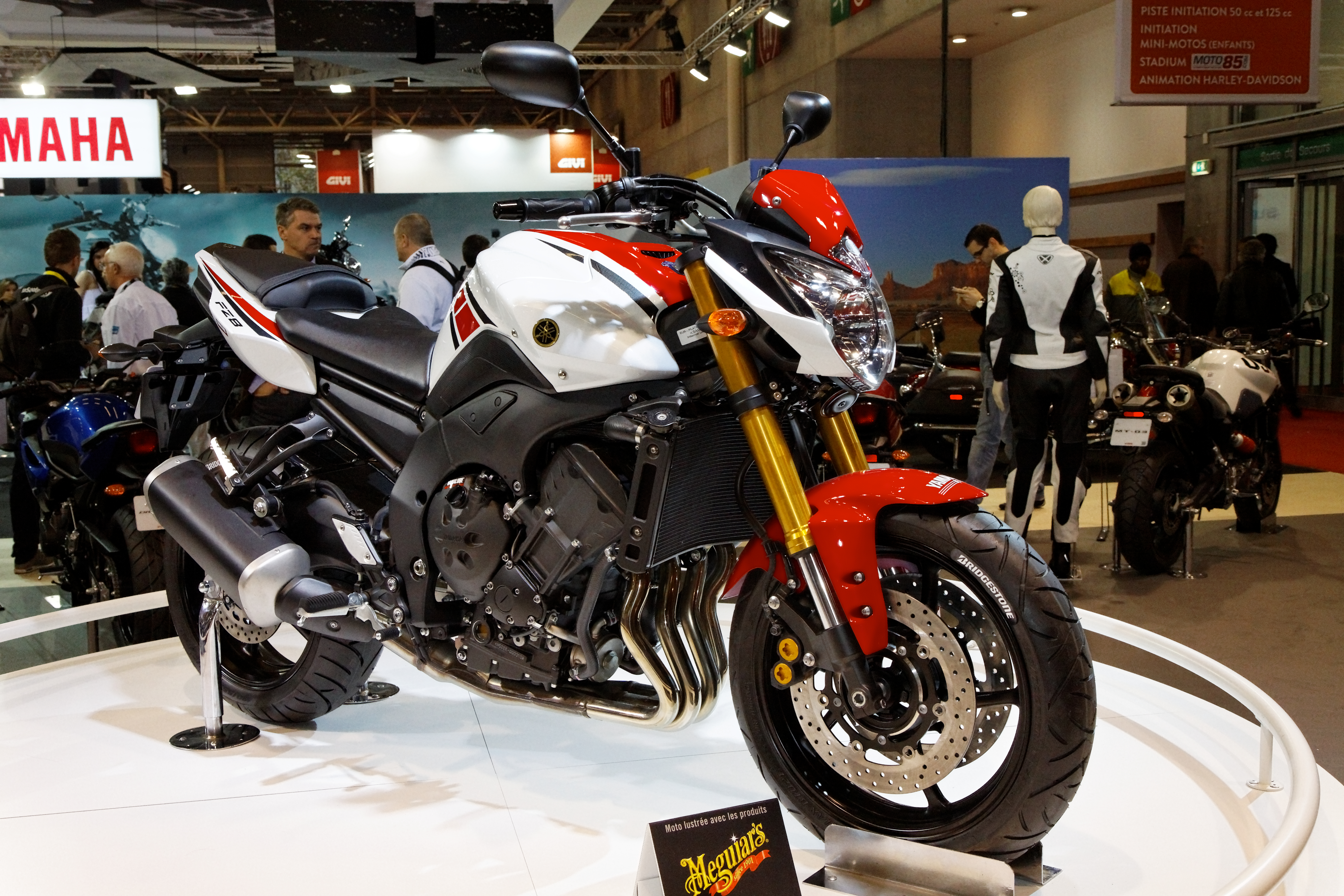 Une moto Yamaha au salon de la moto, Paris, porte de Versailles.